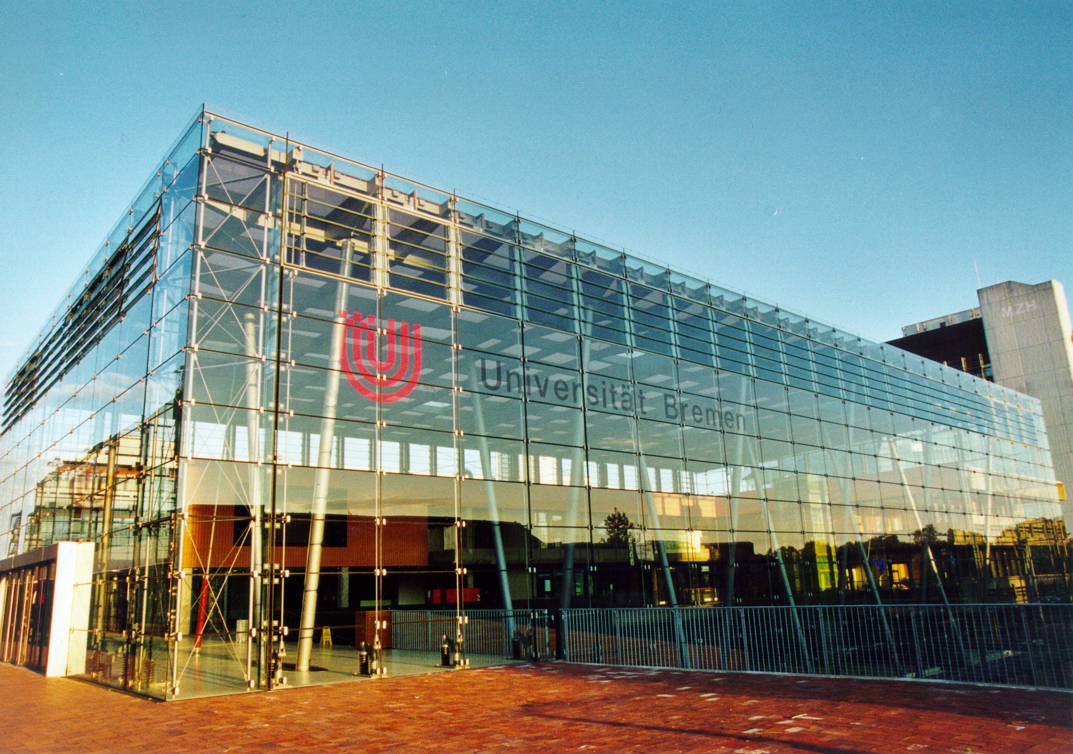 Universität Bremen